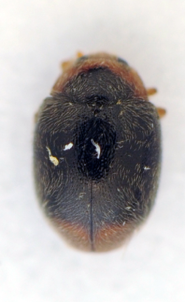 Scymnus haemorrhoidalis